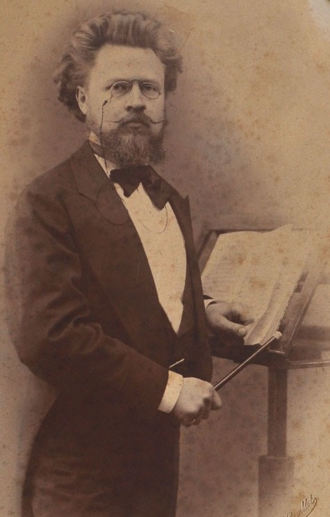 И. И. Слатин — известный русский и украинский музыкально-общественный деятель, пианист и дирижёр, основатель Харьковского отделения ИРМО (1871г.), основатель и директор Харьковского музыкального училища (1883г., преобразованного им в Харьковскую консерваторию ИРМО в 1917году).